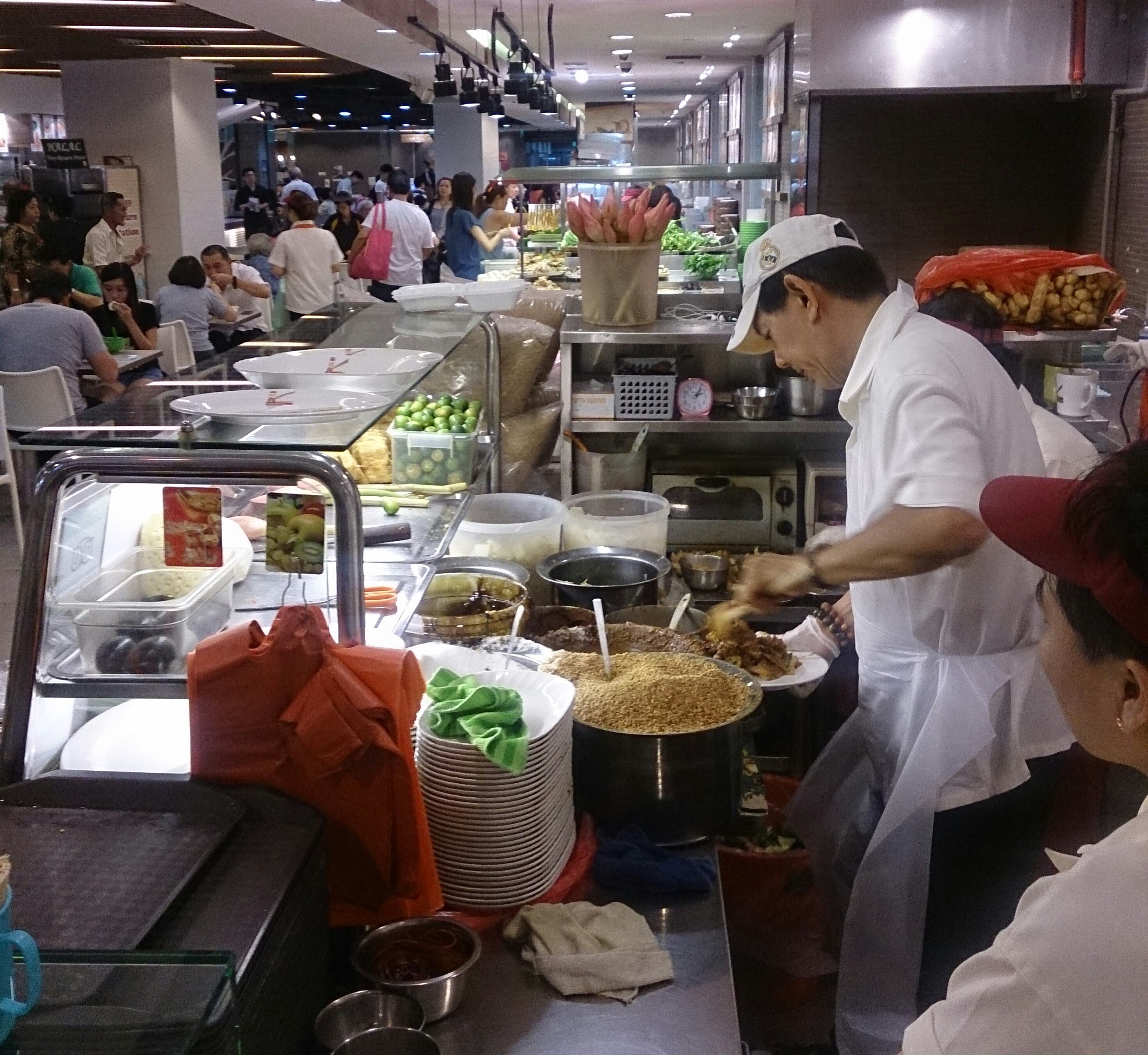 rojak store at Toa Poyah, Singapore